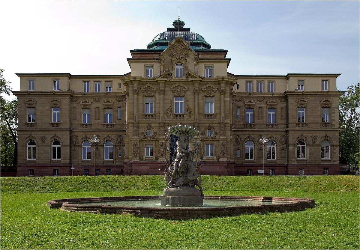 Karlsruhe, Erbgroßherzogliches Palais, heute Sitz des Bundesgerichtshofs.